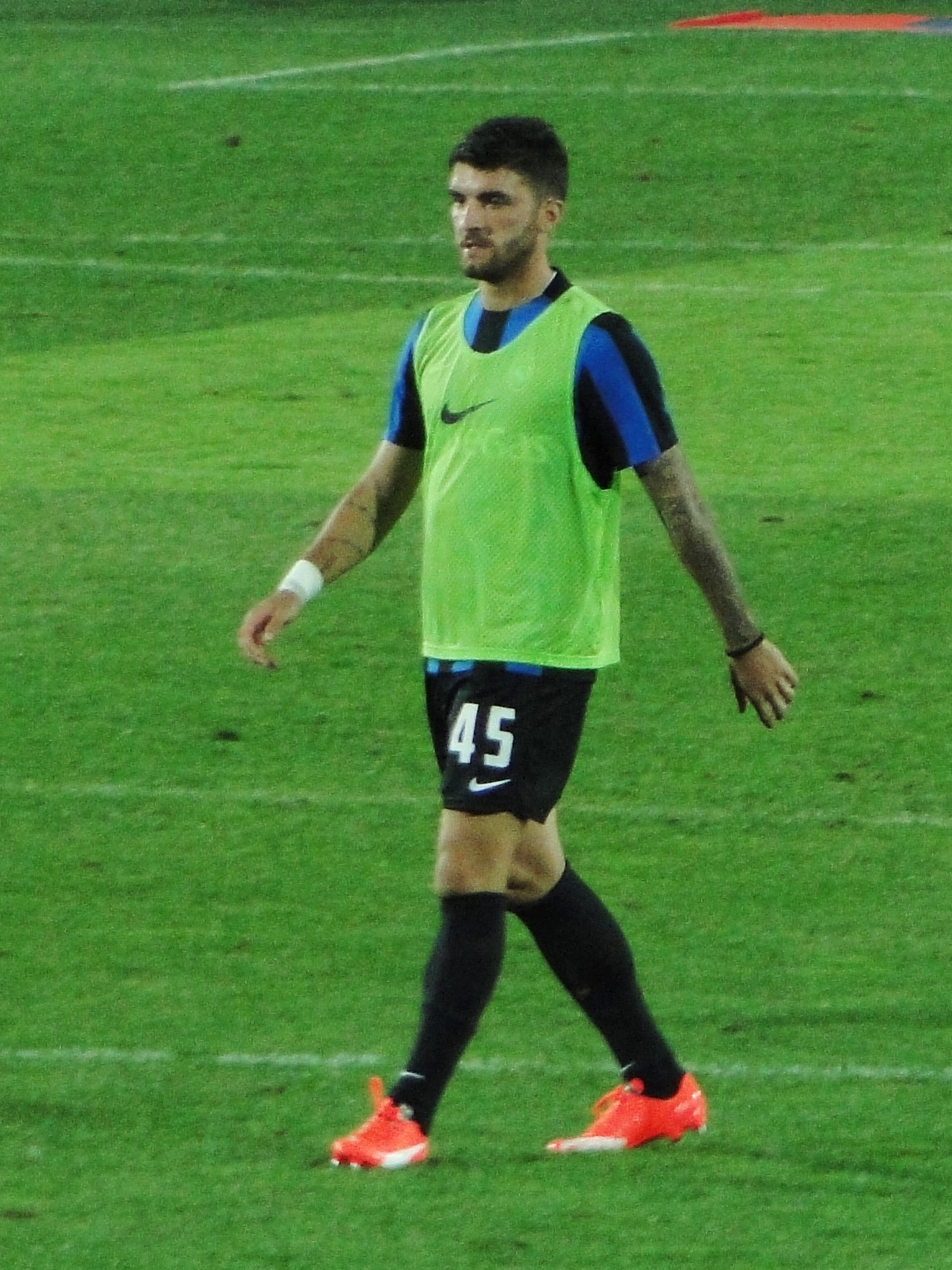 Gaetano Monachello, calciatore italiano, con la maglia dell'Atalanta